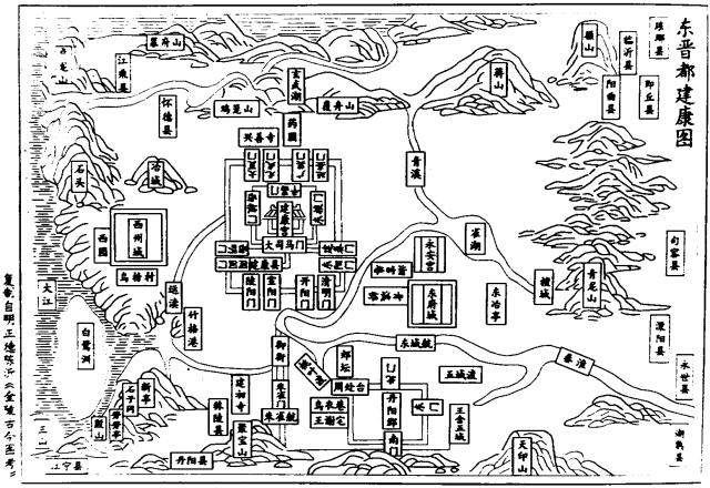 ，建康城地图，复制自明朝陈沂所著《金陵古今图考》。